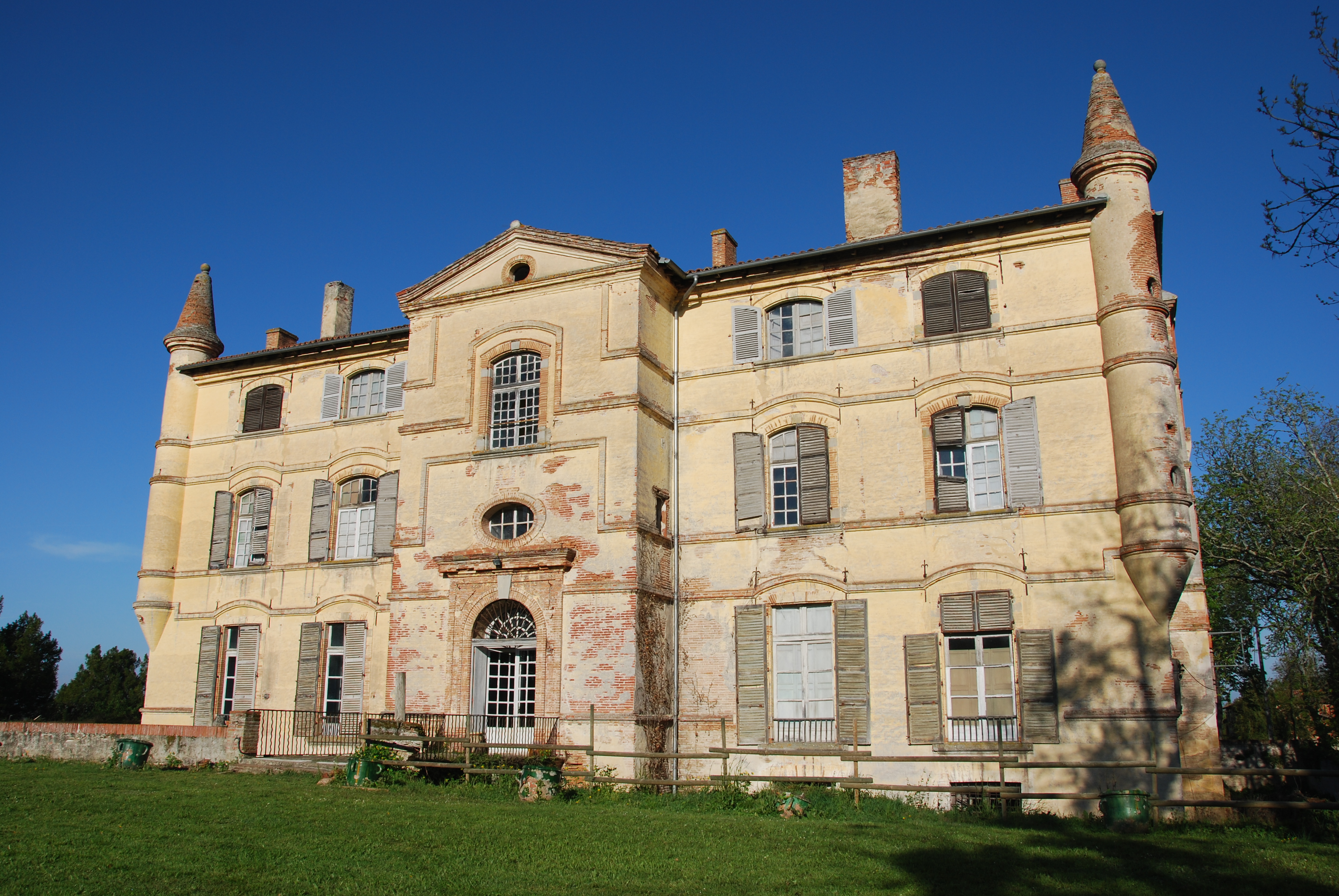 Château, résidence de Pierre Paul Riquet. Où l'histoire du Canal du Midi s'est écrite.